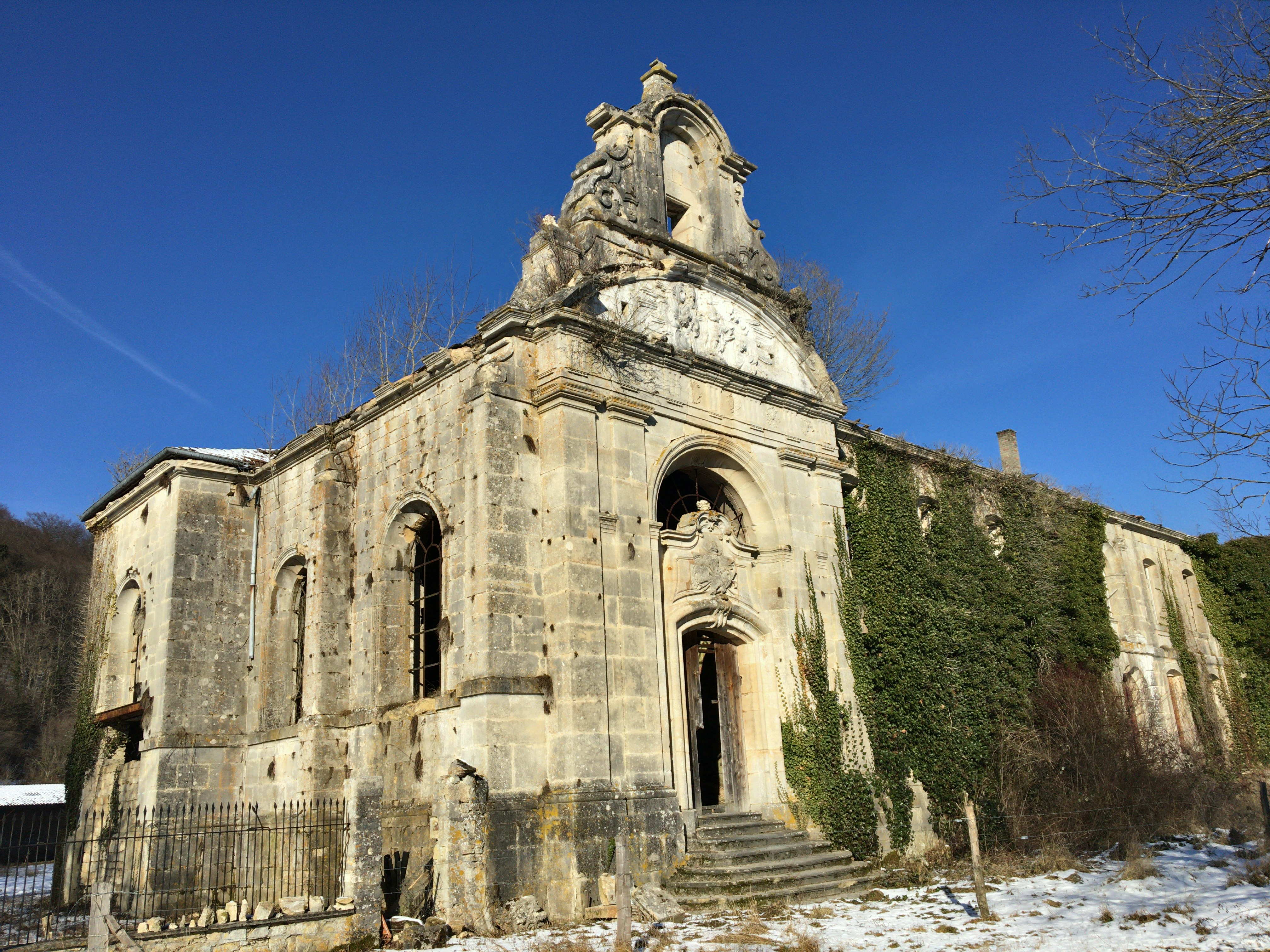 Extérieur